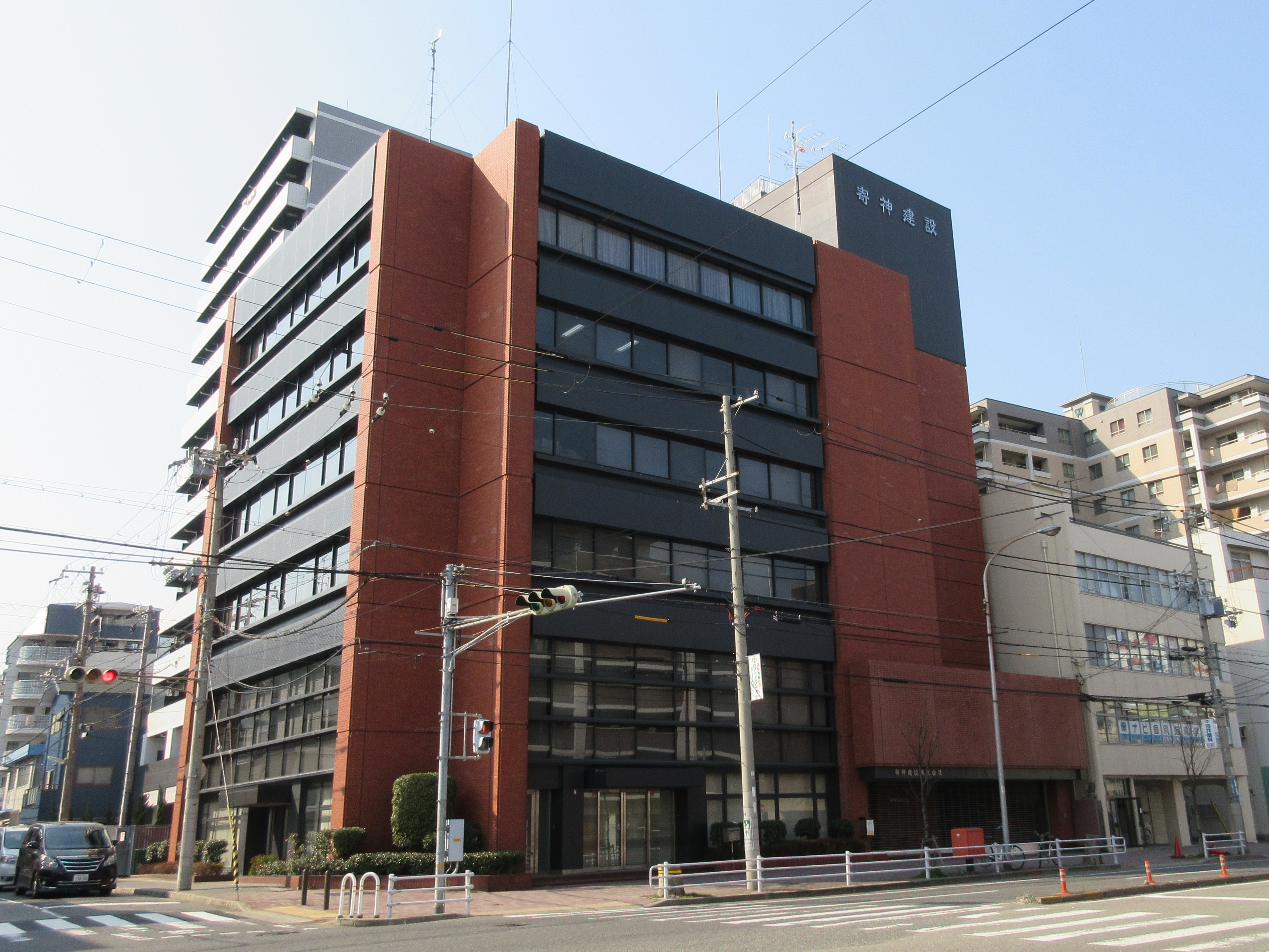 寄神建設本社